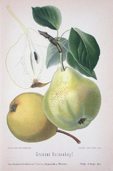 Grosser Katzenkopf by Rudolf Goethe, Aepfel und Birnen, 1894.